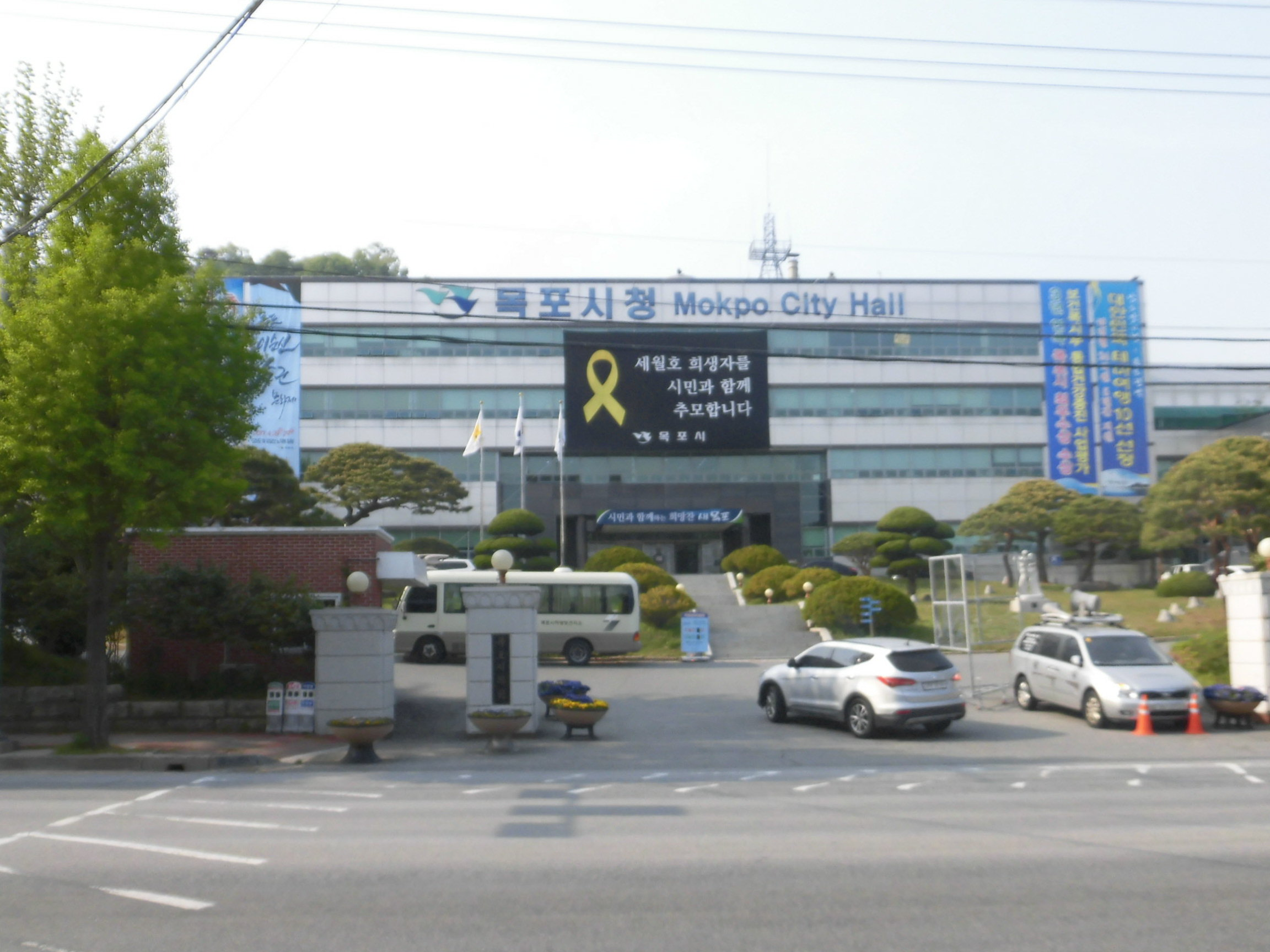 전라남도 목포시에 있는 목포시청